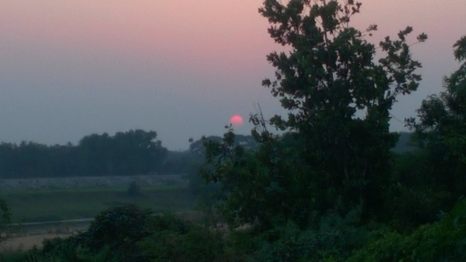 ଓଡ଼ିଆ: Sunset near Kushabhadra